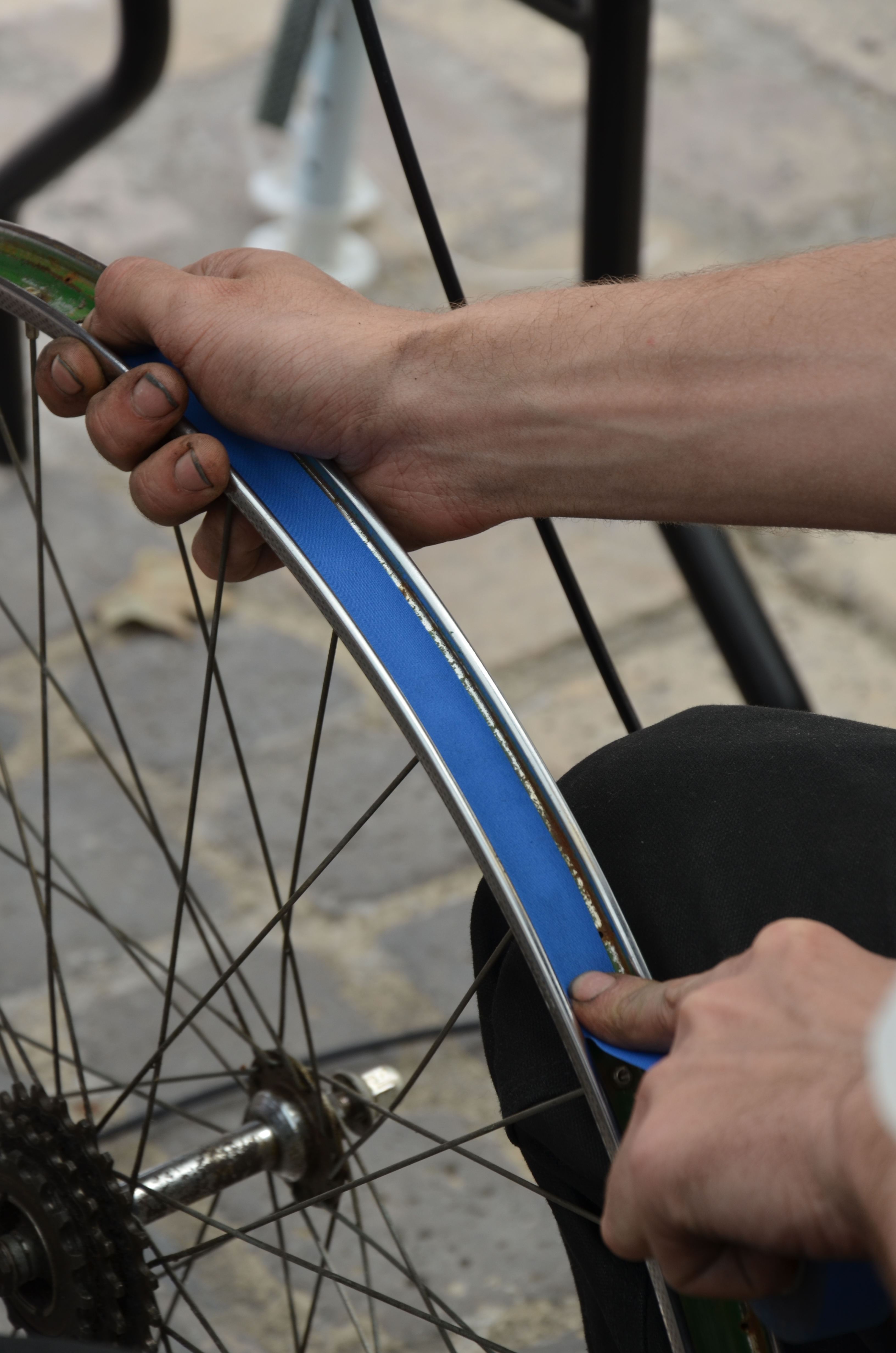 Application d'un fond de jante sur une roue de vélo.